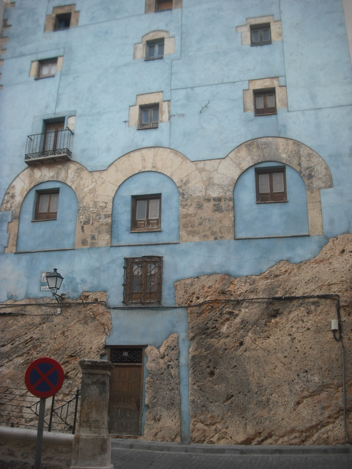 Trasera del Museo de las Ciencias de Castilla-La Mancha.